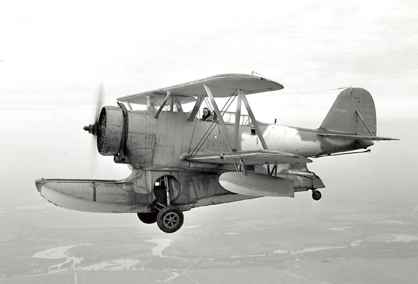 J2F-4surplusflight